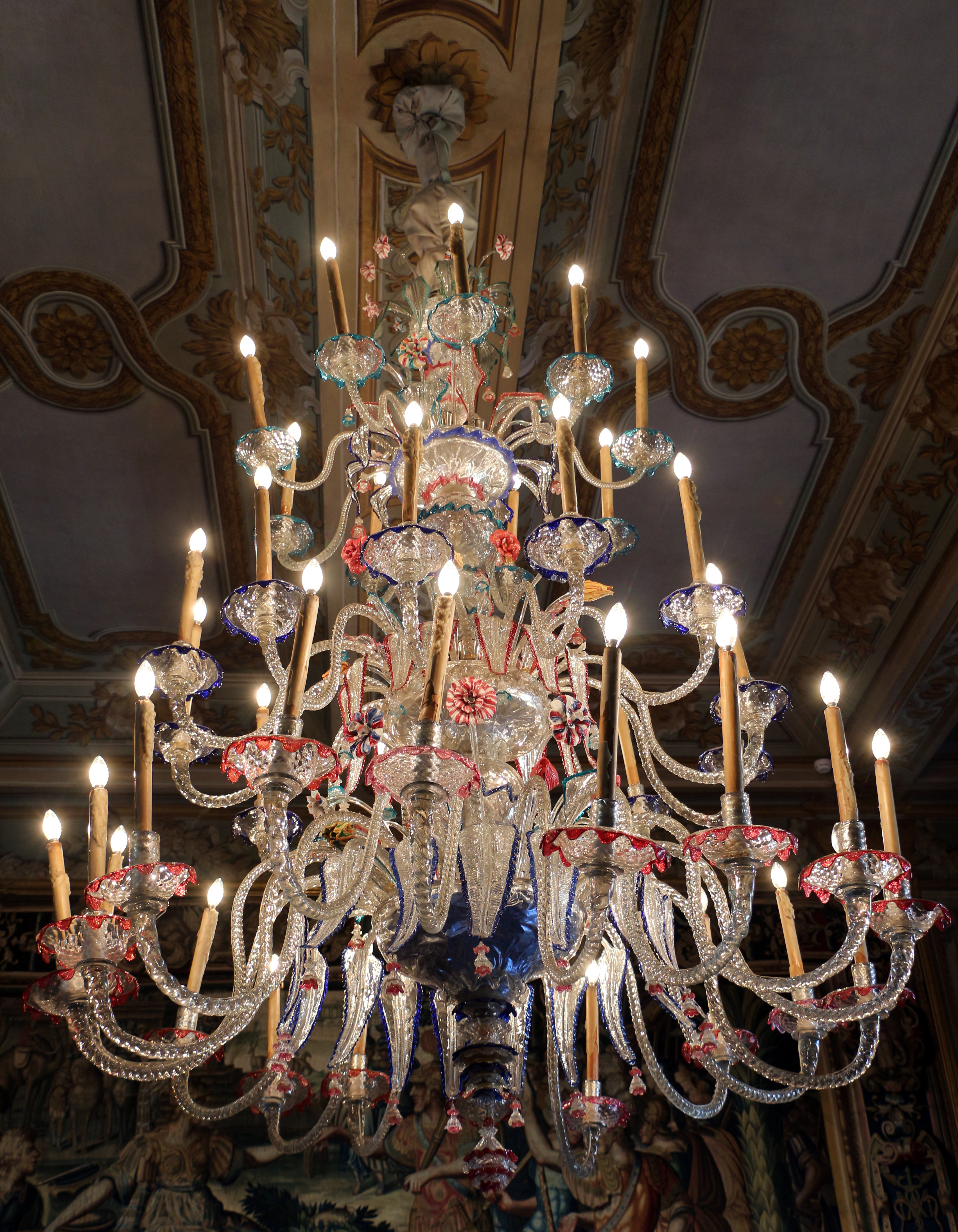 Palazzo colonna, sala della cappella, lampadario di murano del xviii secolo.JPG